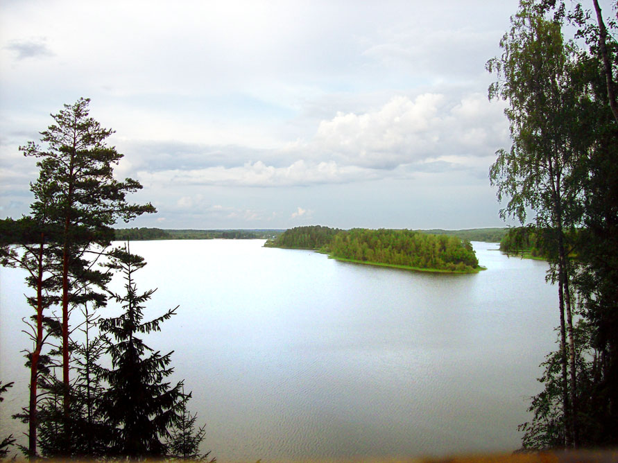 Озеро Сапшо, Багряный и Долгий острова.